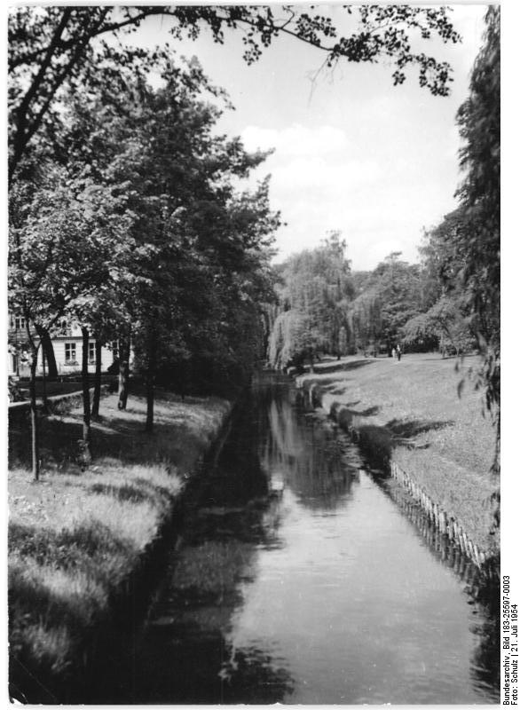 Berlin-Pankow, Bürgerpark, Panke Zentralbild- Schulz - Wettbewerb Volksbürgerpark, Pankow. Volksbürger - Park Pankow, mit Panke 11.00 Uhr mit Belichtung 1-50 Blende 11 m. gelb. F